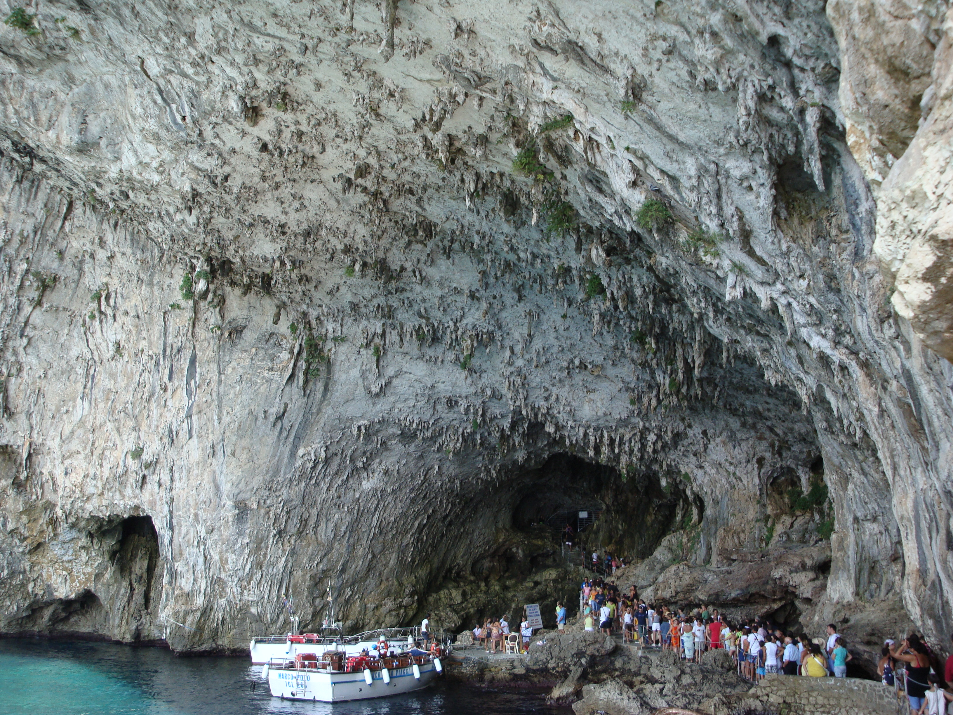 L'entrata della Grotta Zinzulusa nel Salento.